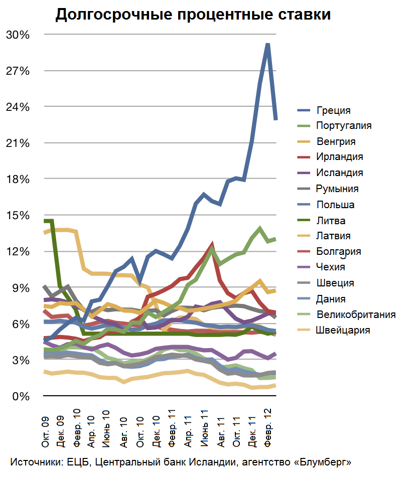 Долгосрочные процентные ставки ряда европейских стран, не входящих в еврозону, а также Греции, Португалии и Ирландии (% в год, средние величины, доходность облигаций со сроком около десяти лет на вторичном рынке). Источник